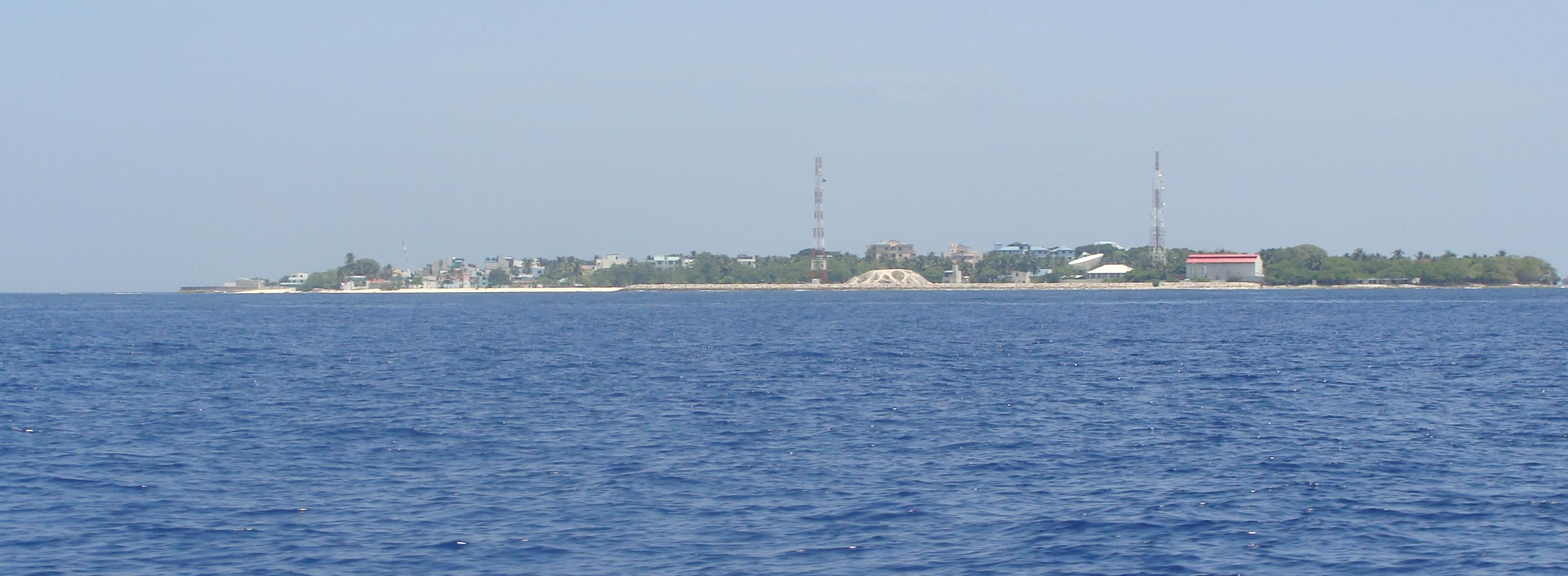 Villingili Island